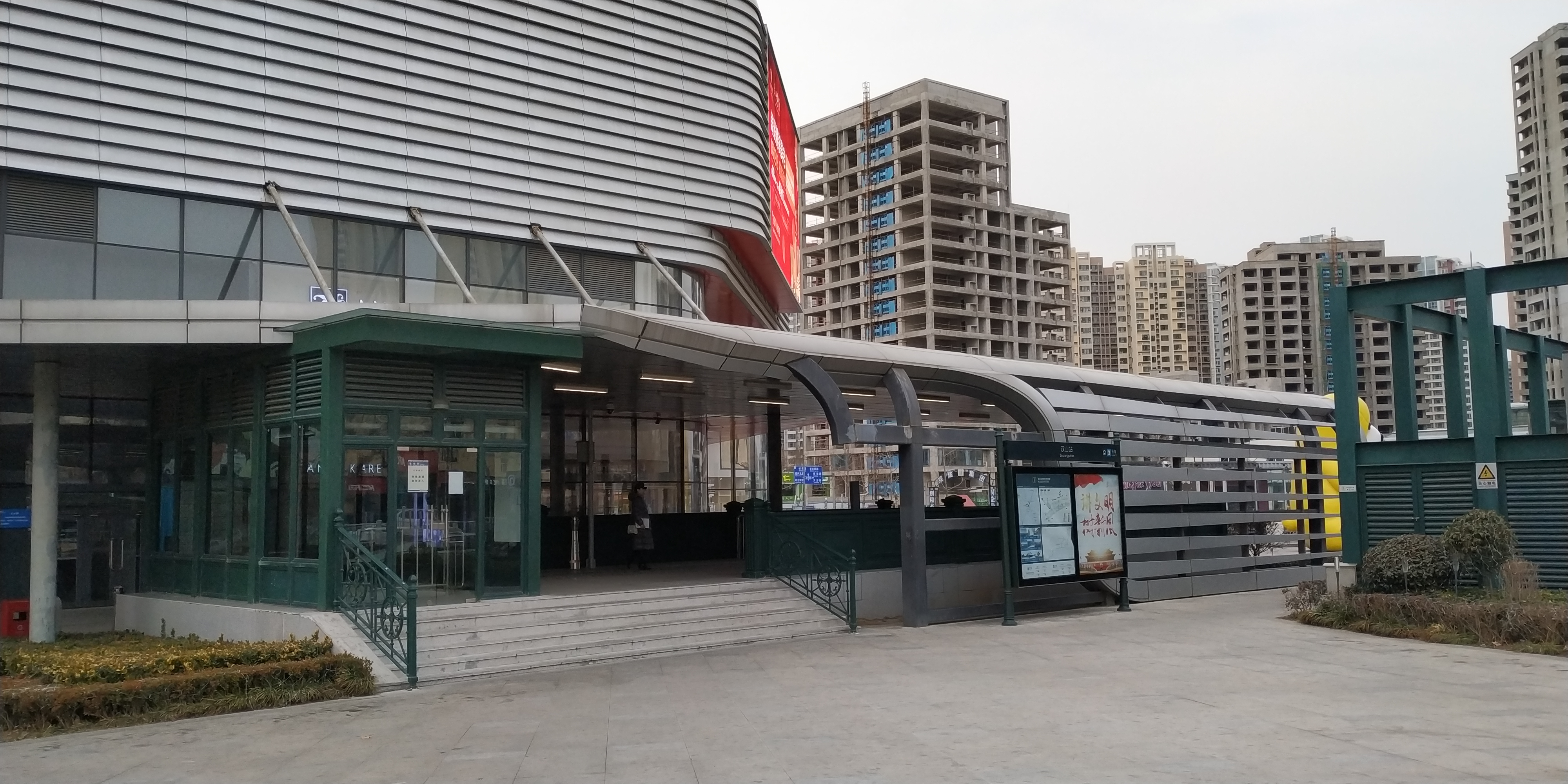 青岛地铁3号线双山站A出入口